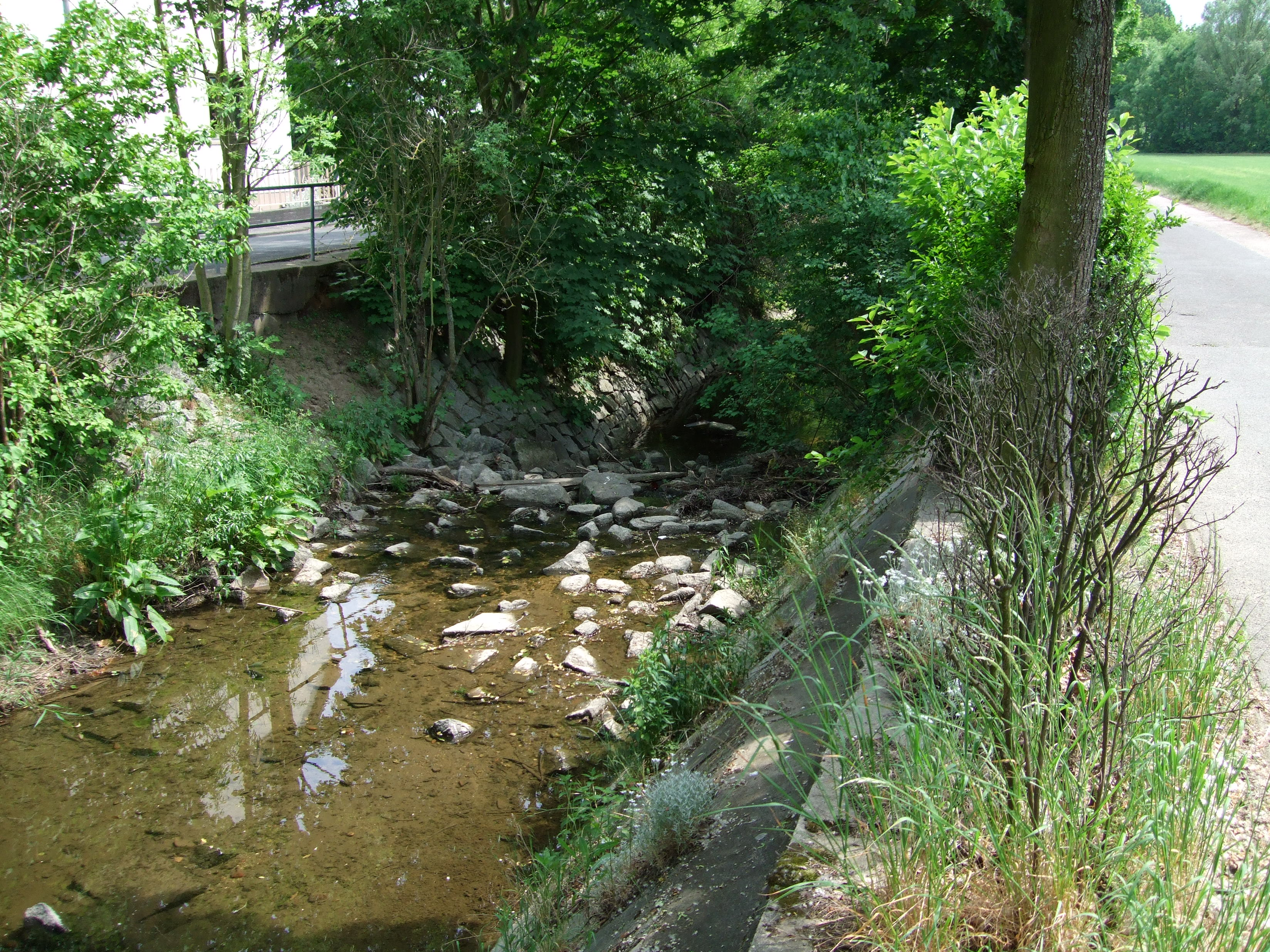 Westerbach in Rödelheim